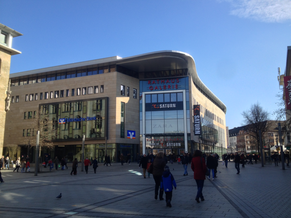 Die Rathausgalerie Hagen gesehen vom Friedrich-Ebert-Platz in Hagen.